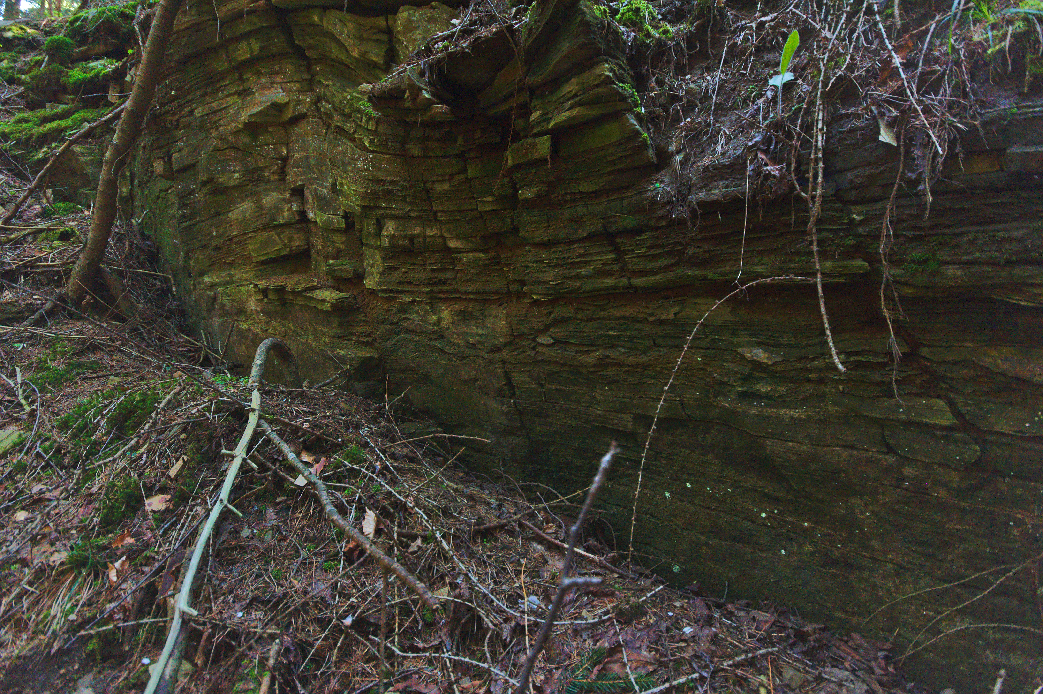 Přírodní památka Lhotské jalovce a stěny, okres Blansko